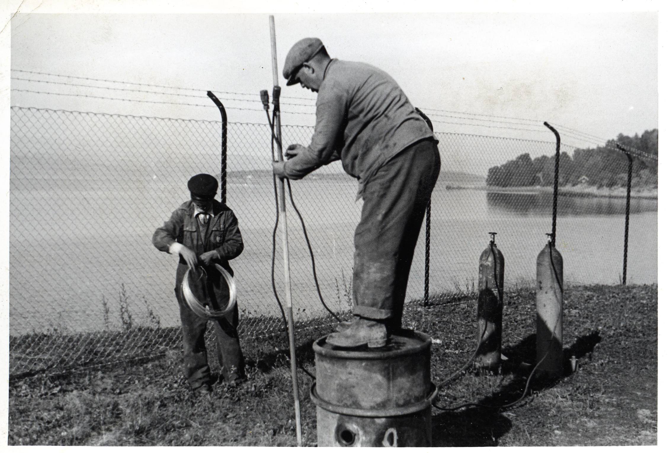 Bildet er hentet fra Arkivverket. Norsk Brændselolje/MIL tankanlegg på Fagerstrand. Før andre verdenskrig. Test av tåkelegging 4. oktober 1939. Arkivinstitusjon : Statsarkivet i Stavanger Arkivnavn : Pa 1761 - Statoil Fuel and Retail Norge AS Sted : Norge, Akershus, Nesodden, Fagerstrand Emneord: Olje, Petroleum, Tankanlegg Avbildet